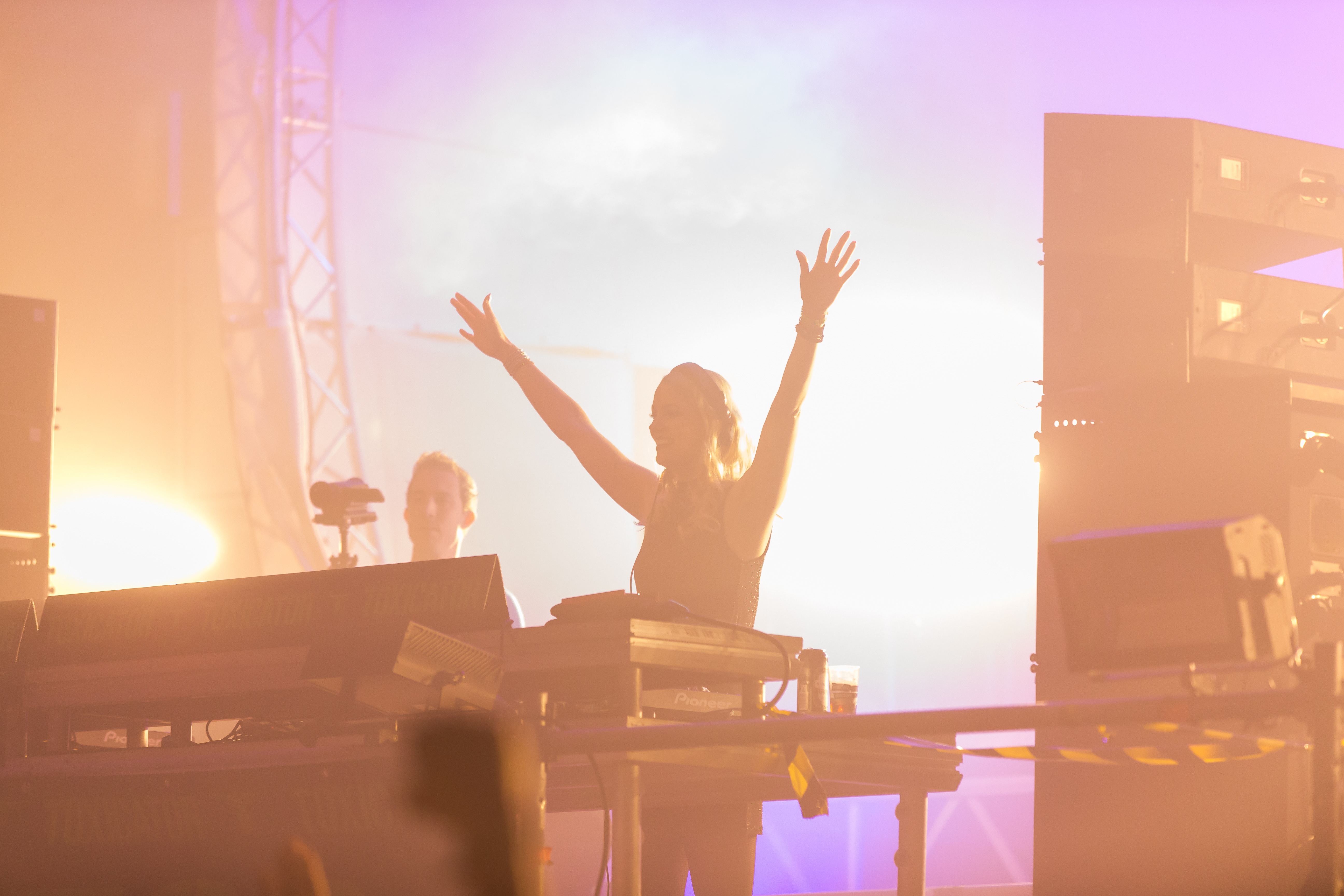 during Toxicator at Maimarkt Halle, Mannheim, Baden Württemberg, Germany on 2015-12-05, Photo: Sven Mandel